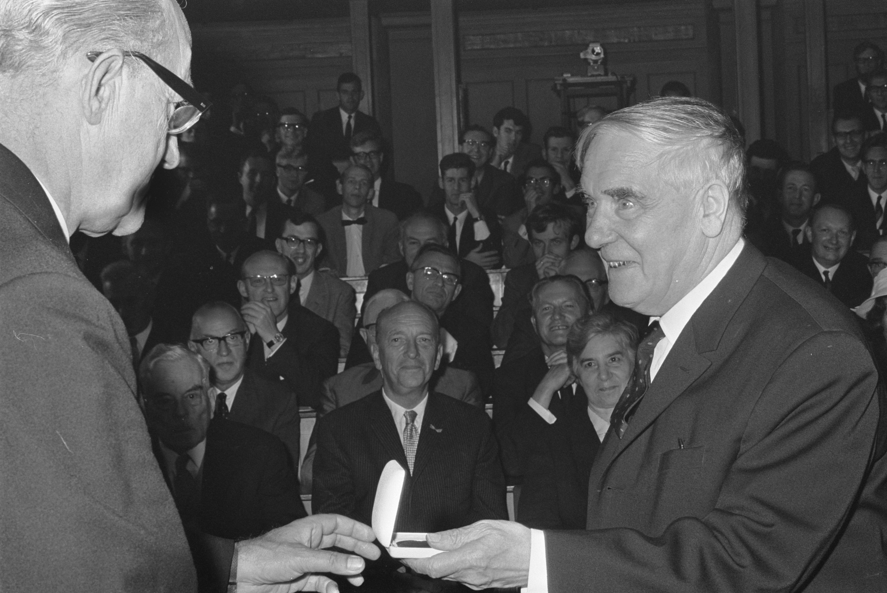 Collectie / Archief : Fotocollectie Anefo Reportage / Serie : Uitreiking van de Kamerlingh Onnes medaille aan prof. dr. P.L. Kapitza (directeur van het instituut voor physische [sic] problemen te Moskou) Beschrijving : De medaille wordt overhandigd Datum : 23 september 1968 Trefwoorden : directeuren, onderscheidingen, wetenschappelijke prijzen Persoonsnaam : Kapitza, P.L. Fotograaf : Fotograaf Onbekend / Anefo Auteursrechthebbende : Nationaal Archief Materiaalsoort : Negatief (zwart/wit) Nummer archiefinventaris : bekijk toegang 2.24.01.05 Bestanddeelnummer : 921-7048